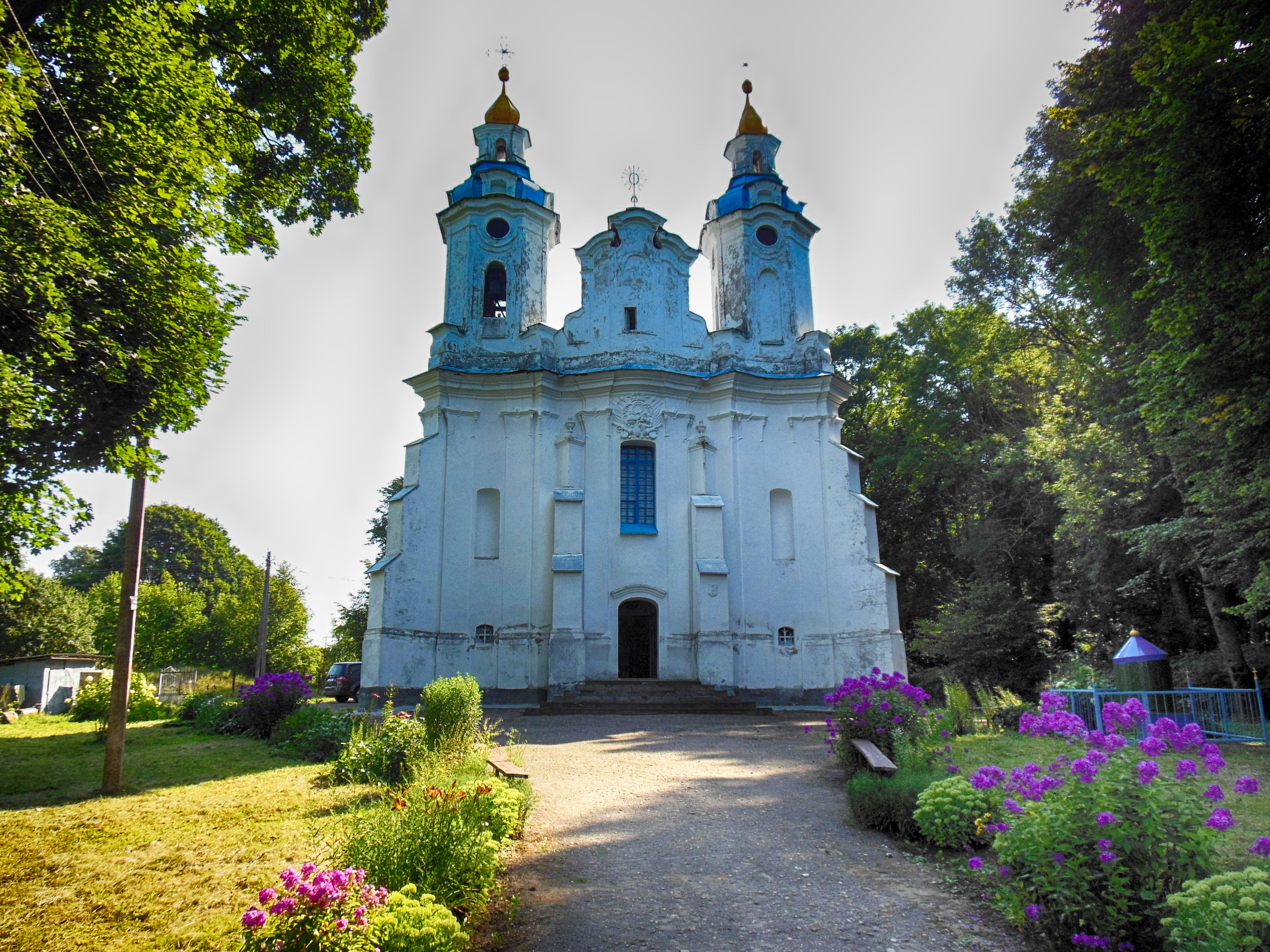 Беларуская (тарашкевіца): Троіцкая царква. в. Вольна This is a photo of Belarusian heritage monument. Reference number: 112Г000051 ( WLM)